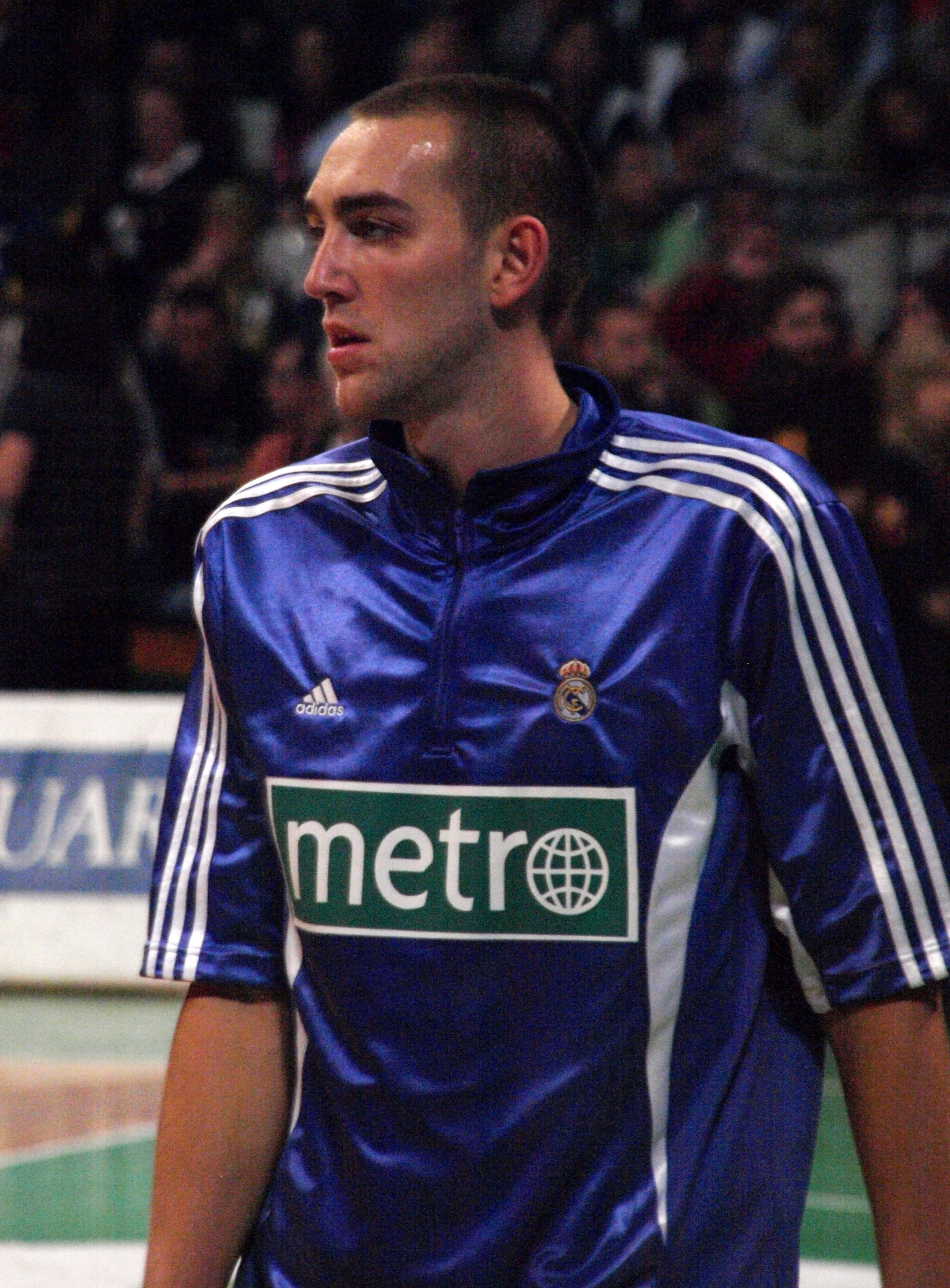 Axel Hervelle en el Olímpico de Badalona en noviembre de 2008